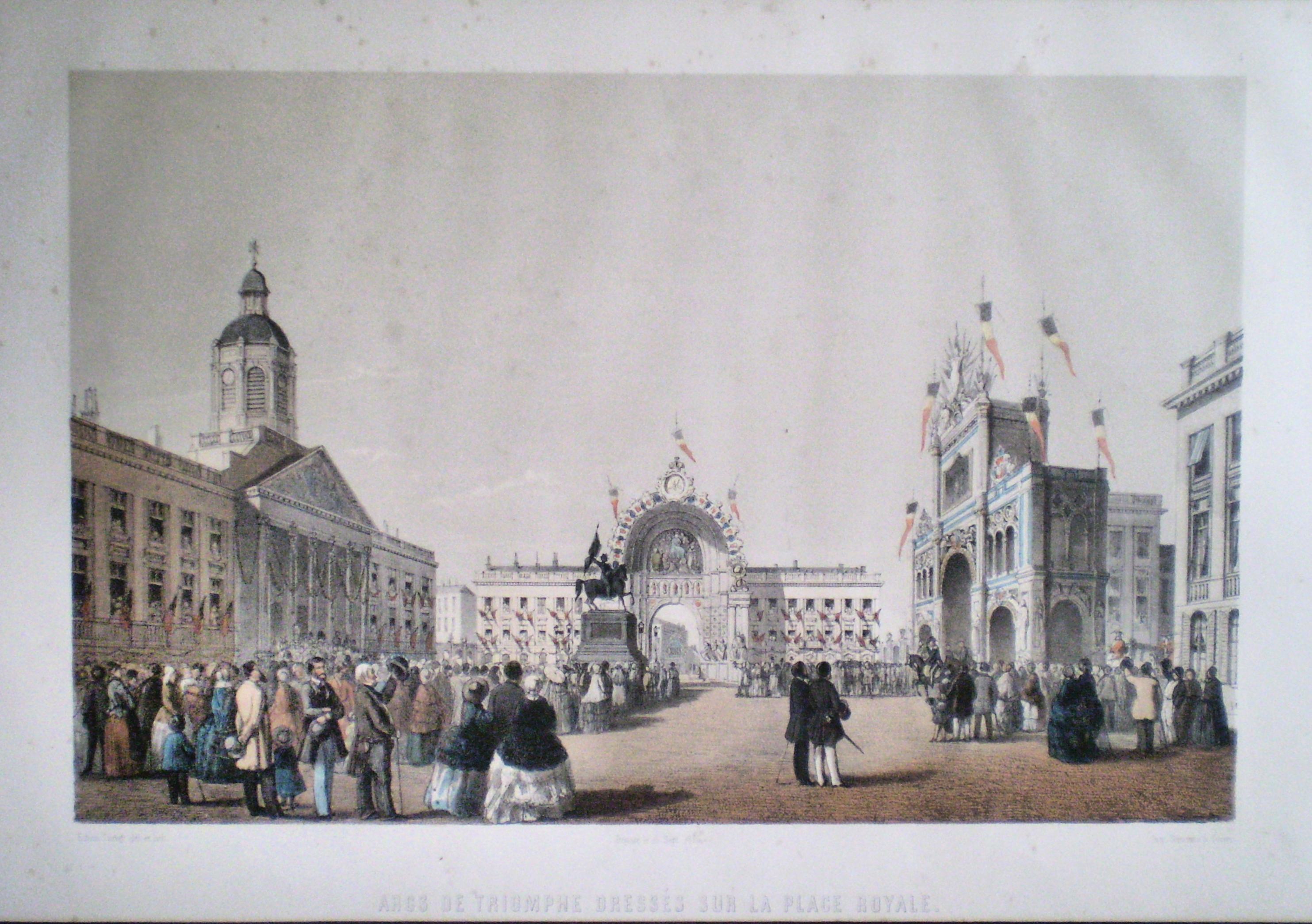 Cérémonies et fêtes qui ont lieu à Bruxelles, du 21 au 23 juillet 1856, à l'occasion du XXVe anniversaire de l'inauguration du règne de Sa Majesté le Roi Léopold Ier Imprimé chez Gustave Simonau & William Toovey, édité par Jules Geruzet, libraire et photographe, rue des Éperonniers, 6, à Bruxelles, 1856